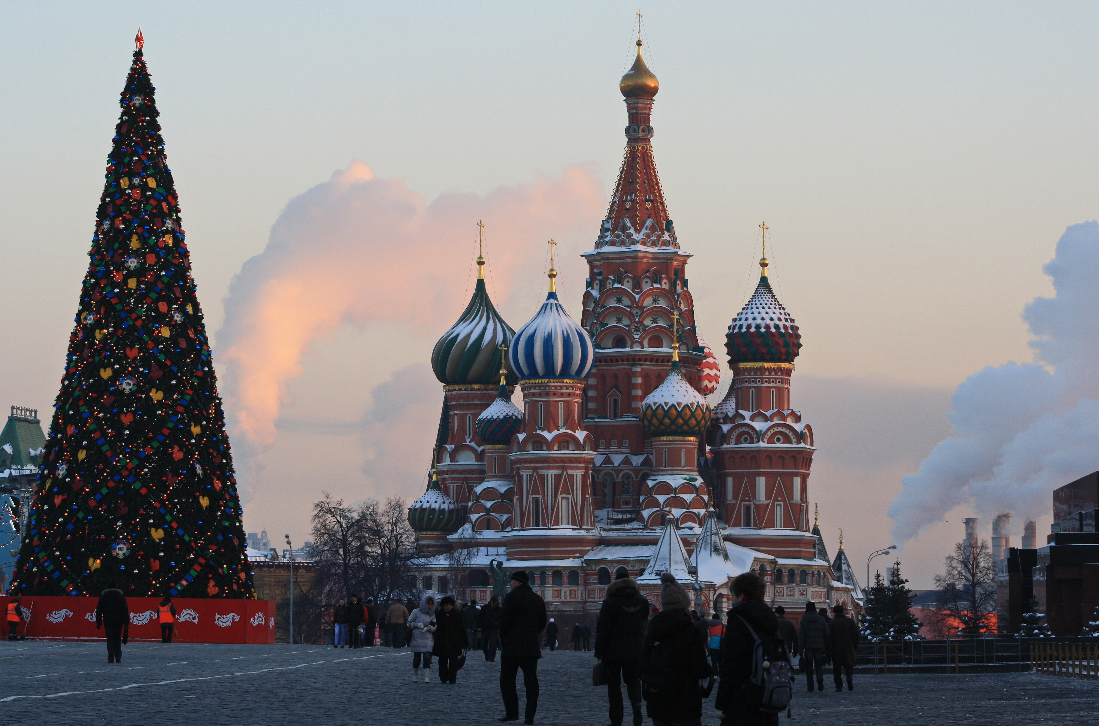 Basilius-Kathedrale auf dem Roten Platz in der russischen Hauptstadt Moskau.